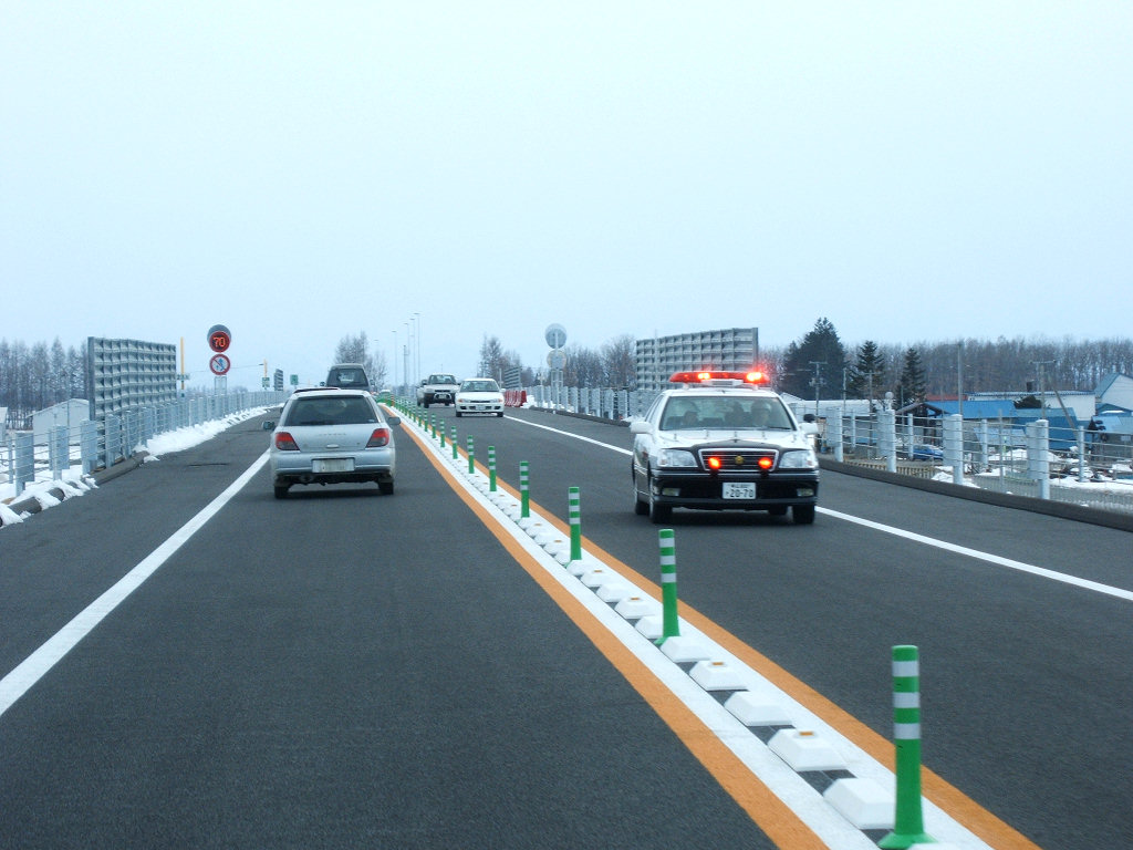 Obihiro Hiroo EXPWY. Hokkaido